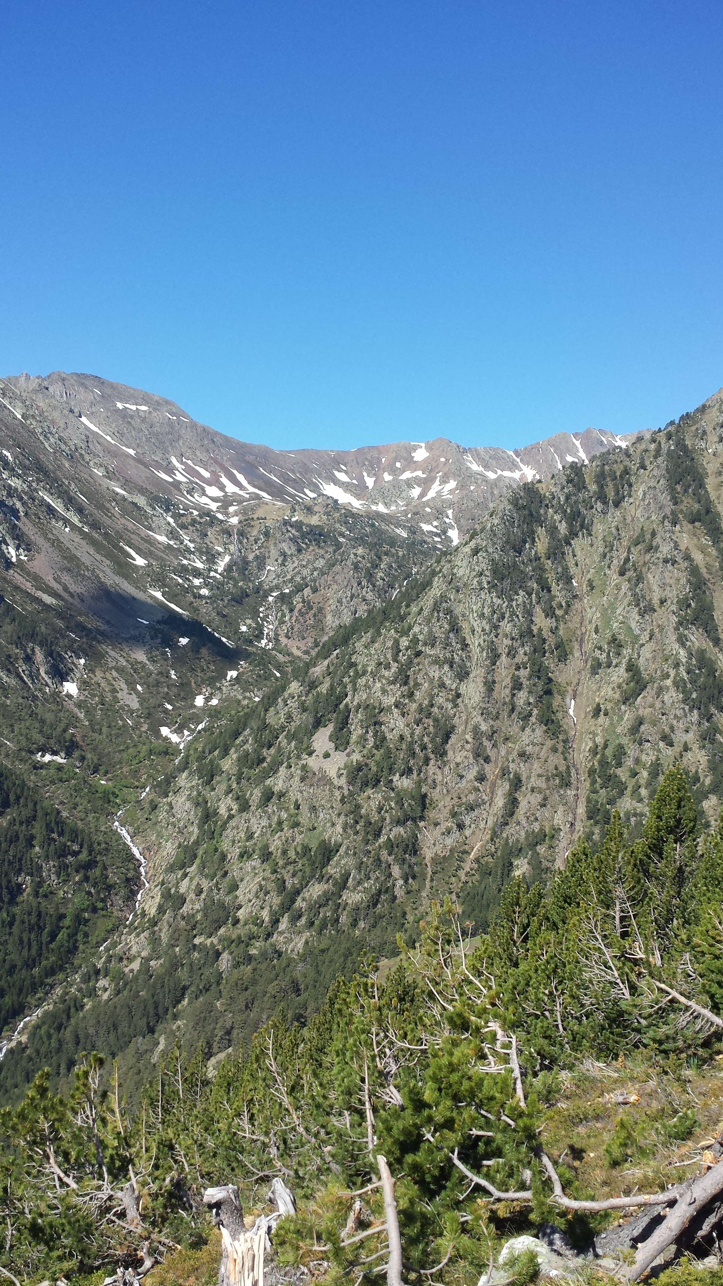 Valls del Comapedrosa (la Massana) This is a a photo of a natural area in Andorra with id: AD-PNCVC